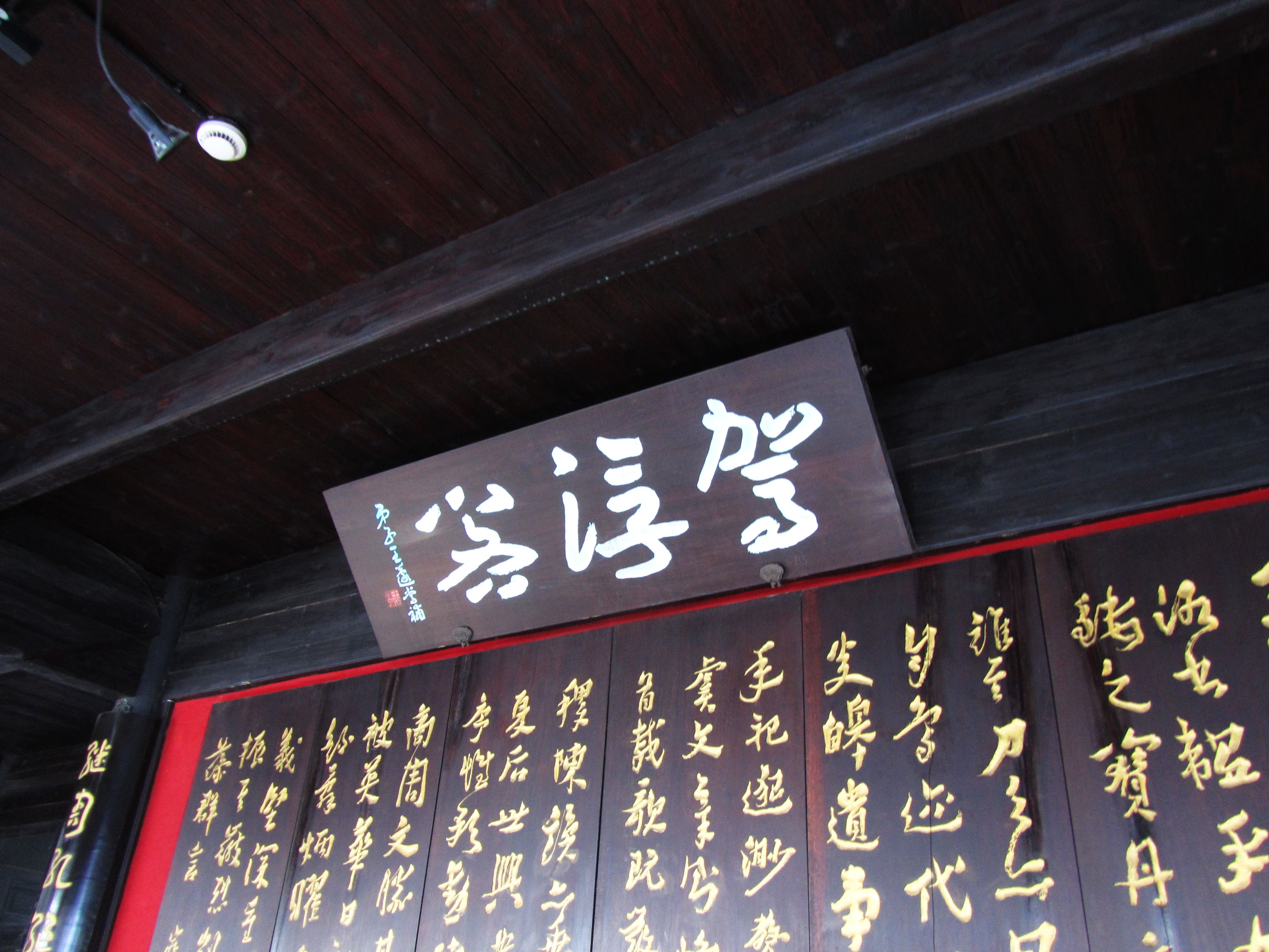 嘉兴沈曾植故居，第一进匾额。